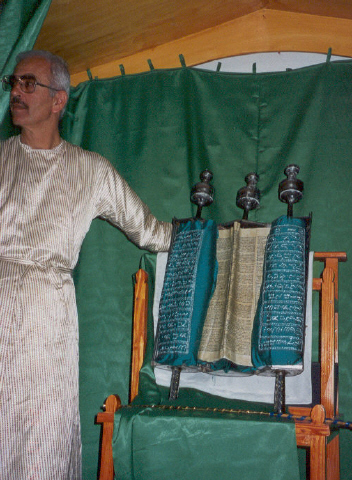 צולם ע"י הגב' אביבה רוסט